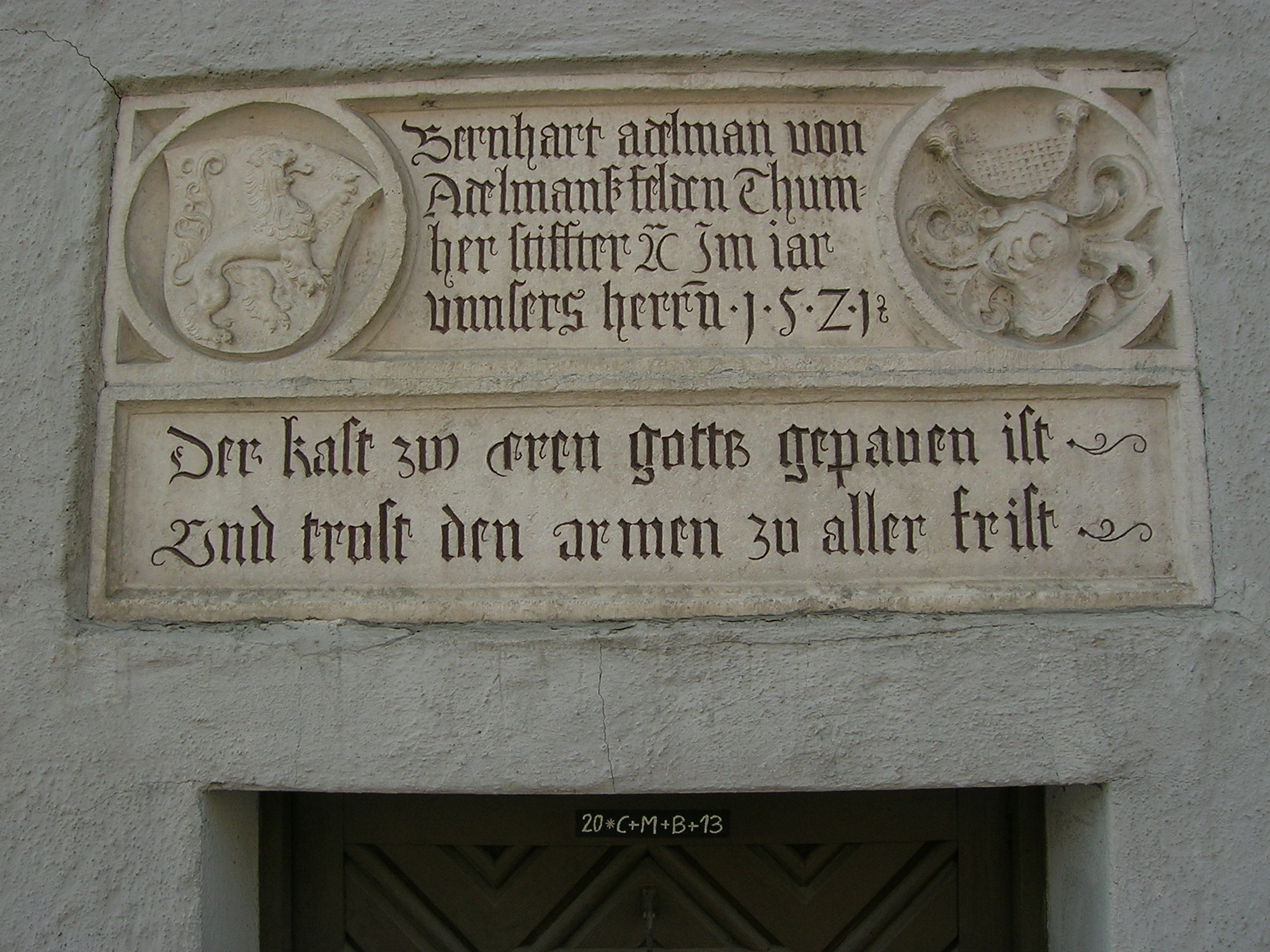 Inschrift am Haus Ingolstädter Straße 3 in Eichstätt, dem früheren Getreidekasten der Sebastiansbruderschaft aus dem Jahr 1521. Die Inschrift nennt Bernhard Adelmann von Adelmannsfelden als Stifter und Domherr. Inschrift: Bernhart adlman von Adlmanßfeldn Thumher Stiffter ? Im jar unnsers herrn 1521 Der Kast zu eren Gotts gepauen ist und trost den armen zu aller frist